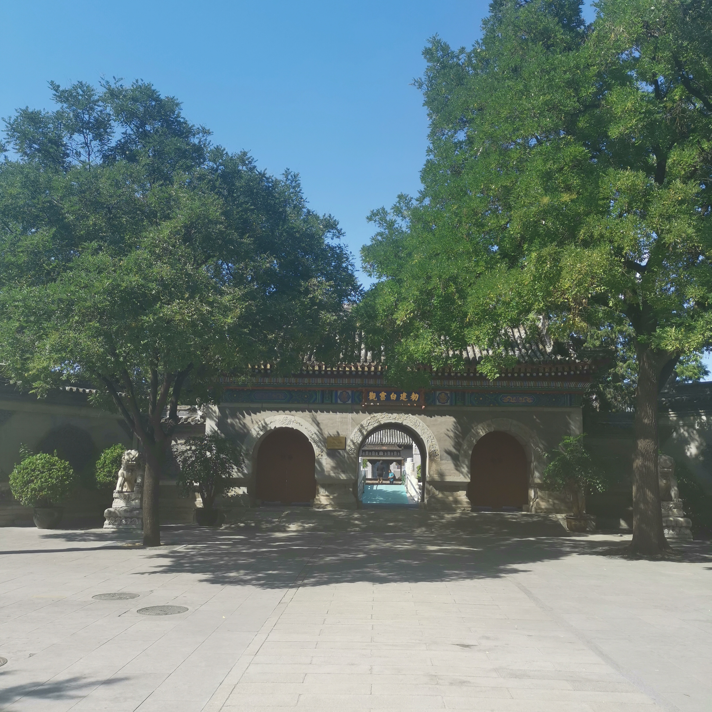 中文（中国大陆）: 白云观山门